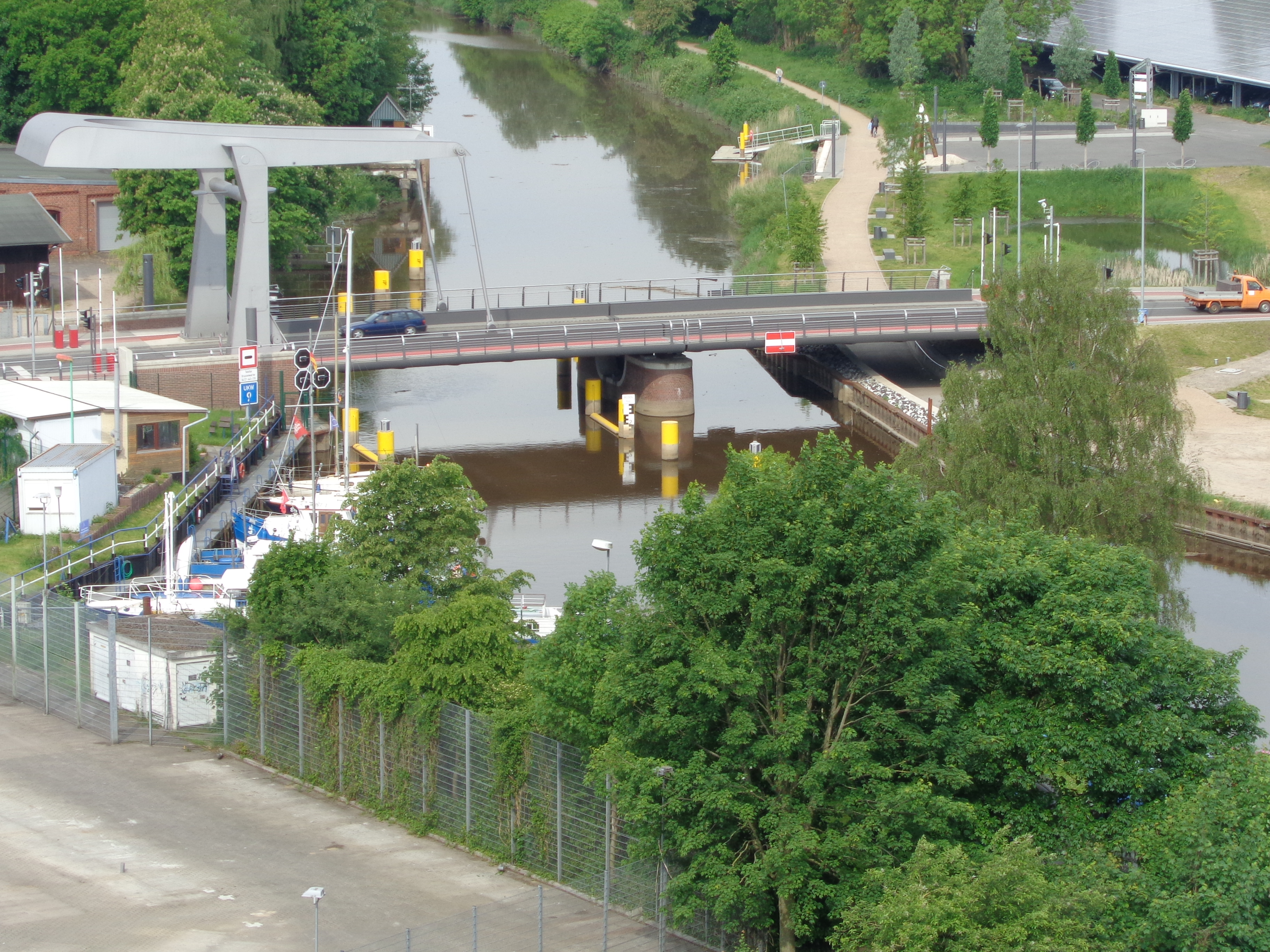 Klappbrücke über die Krückau in Elmshorn, vom Dach des Verwaltungsgebäudes der Peter Kölln KGaA